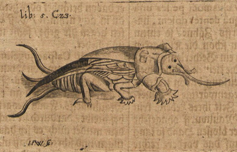 Original image description from the Deutsche FotothekLandwirtschaft & Pflanzenbau & Maulwurf